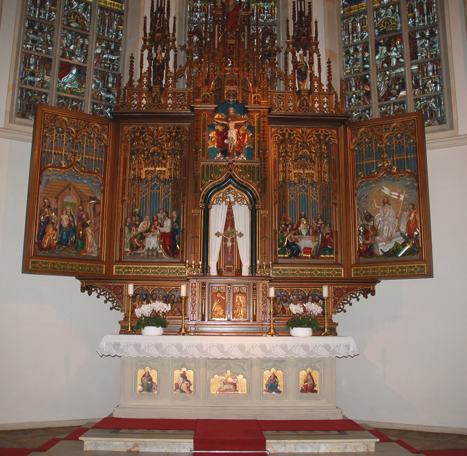 Hochaltar in der St. Idakirche in Herzfeld (Westf.)